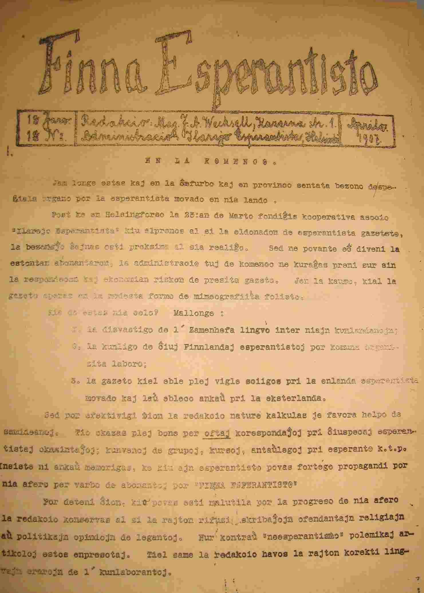 Priskribo Gazeto Finna esperantisto